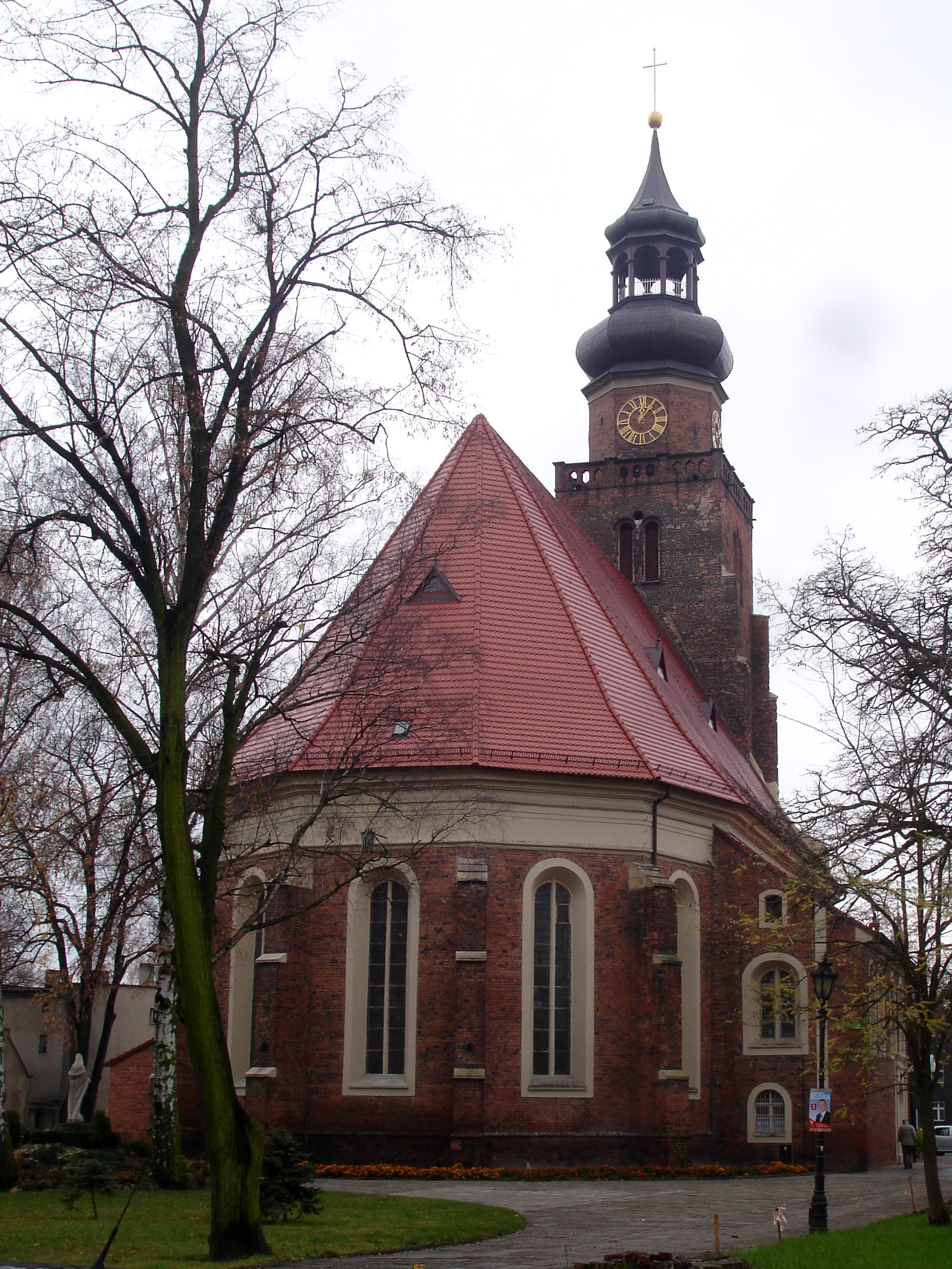 Kościół pw. św. Jana w lesznie - strona wschodnia